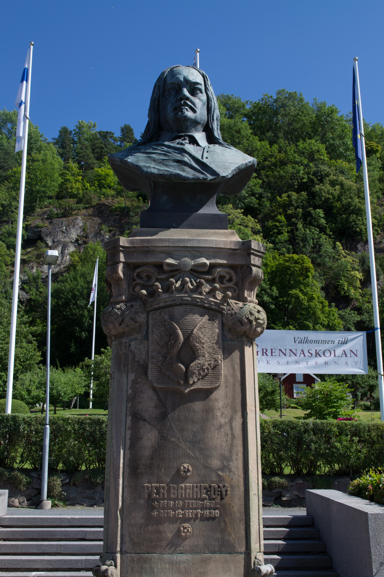 Gränna